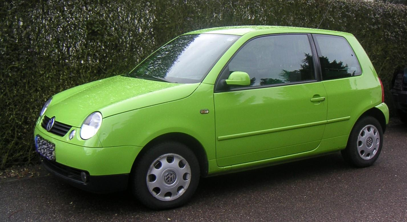 Volkswagen car Lupo